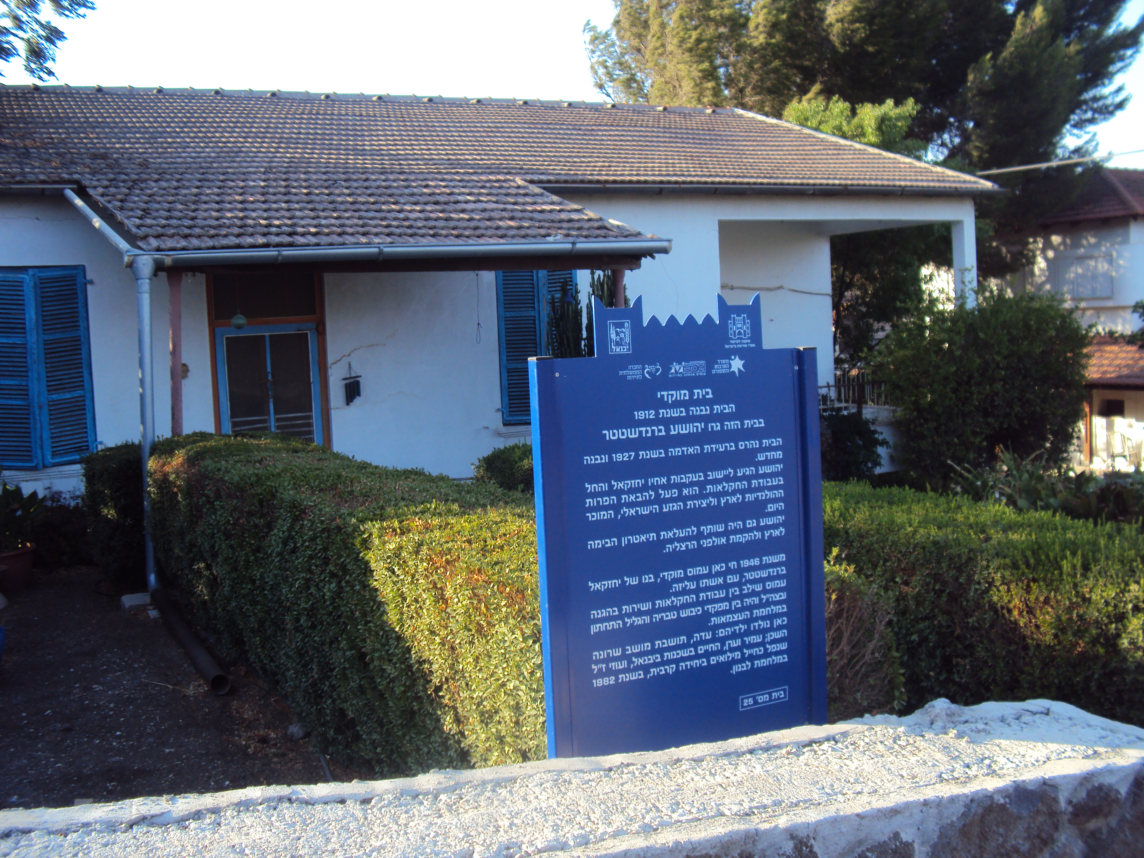 בית מוקדי ביבנאל, הגליל התחתון, ישראל